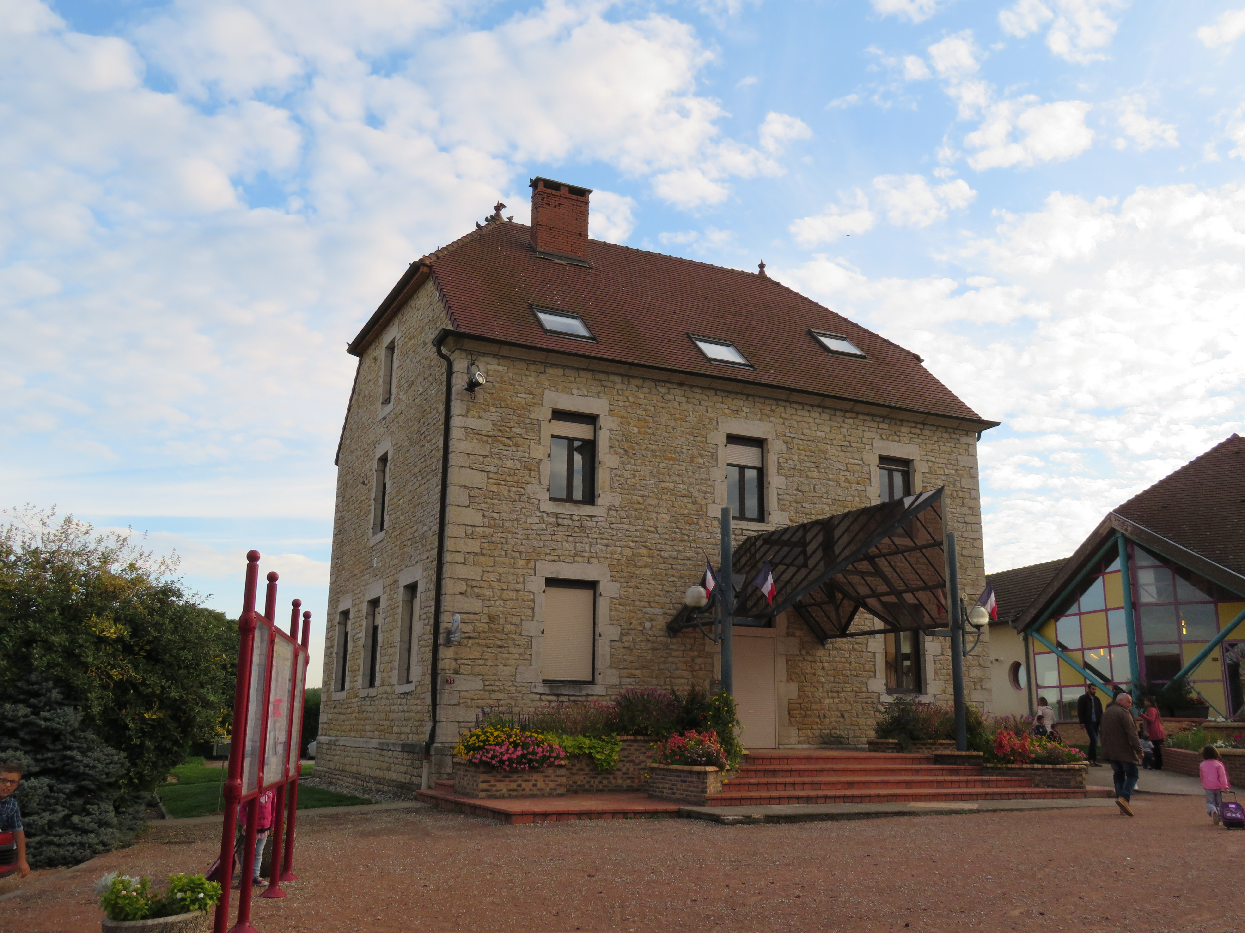 Mairie de Commenailles, dans le département du Jura.